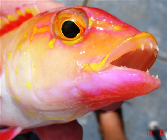 Testa di D. puellaris